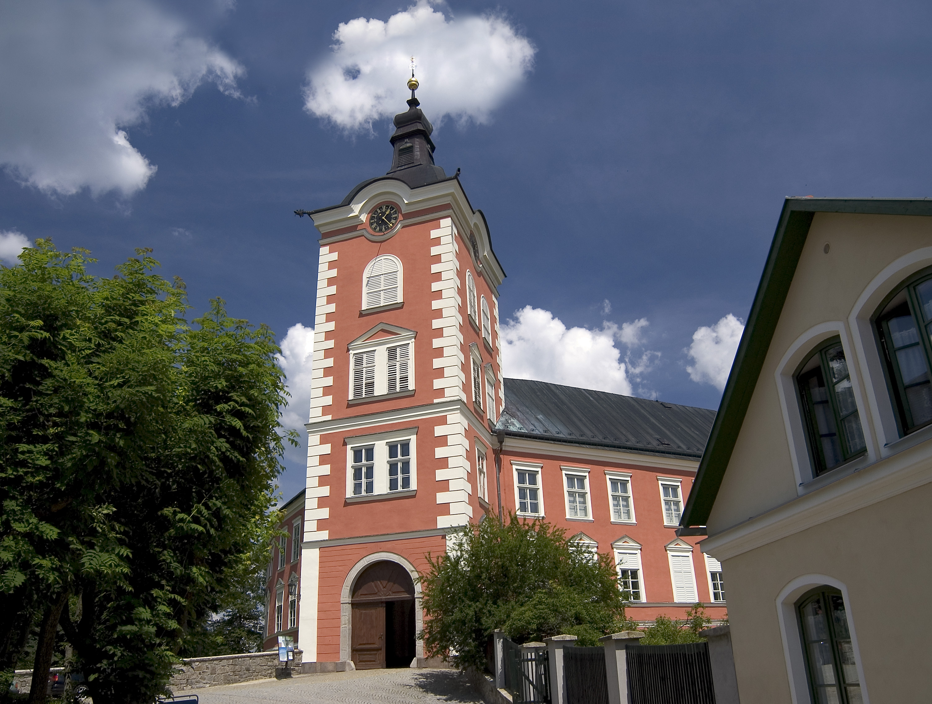 Chateau at Kamenice nad Lipou